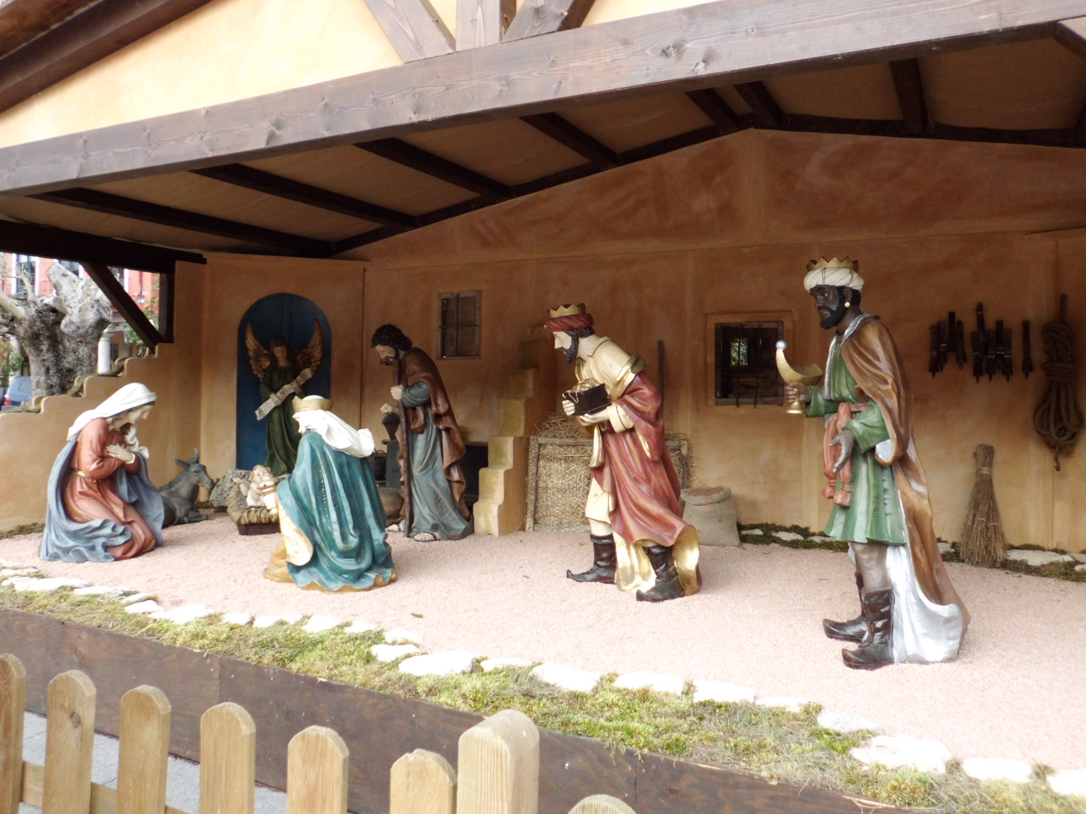 Nacimiento en 2012. Cada año en la plaza Mayor de Valladolid se expone un nacimiento con figuras de tamaño natural. El de la foto es regalo de un ciudadano empresario llamado Javier.